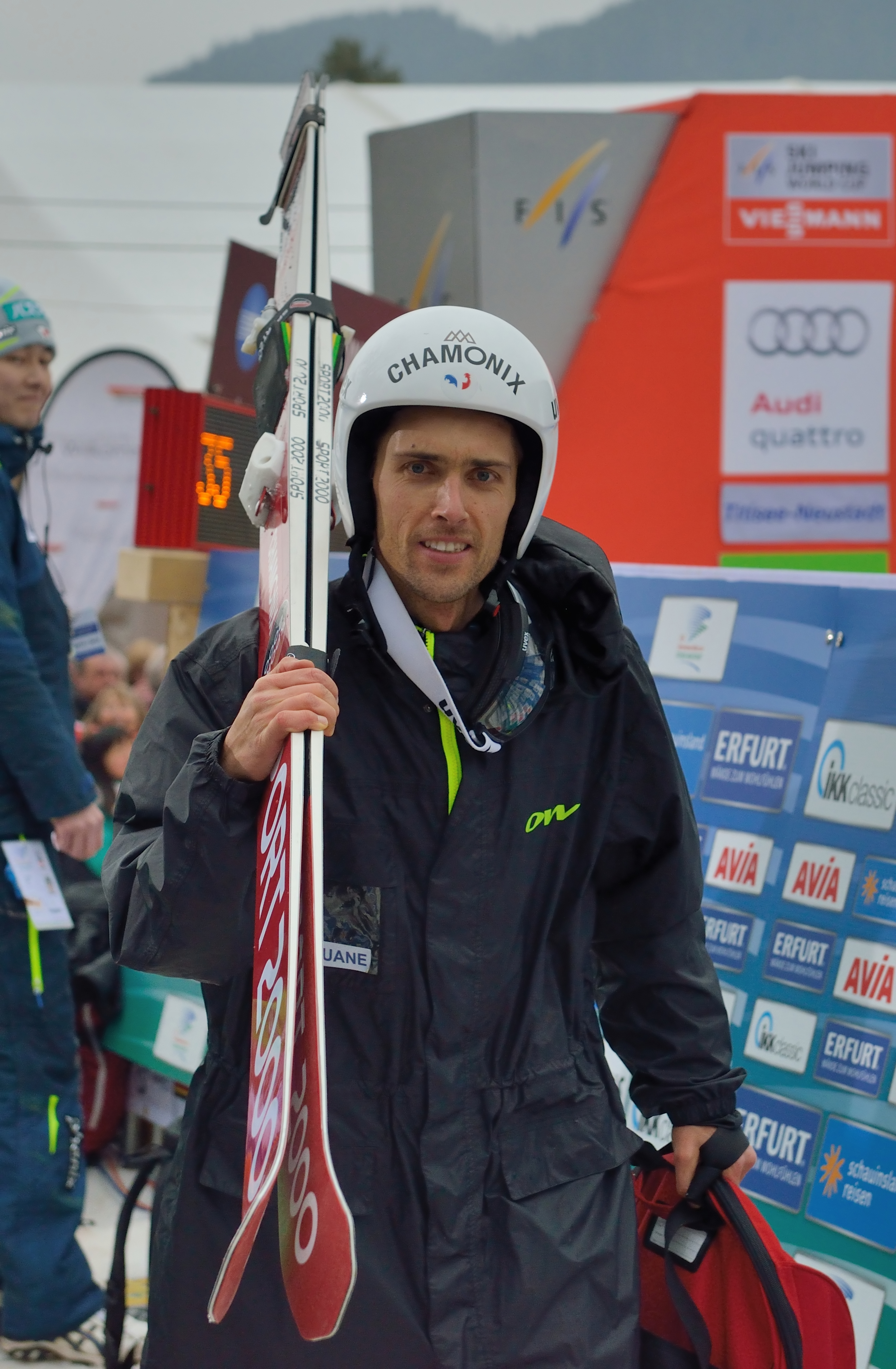 FIS Ski Weltcup Titisee-Neustadt 2016